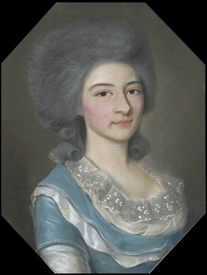 Бахметева Мария Семеновна, ур.Львова (1766- после 1839) ,фаворитка Орлова-Чесменского